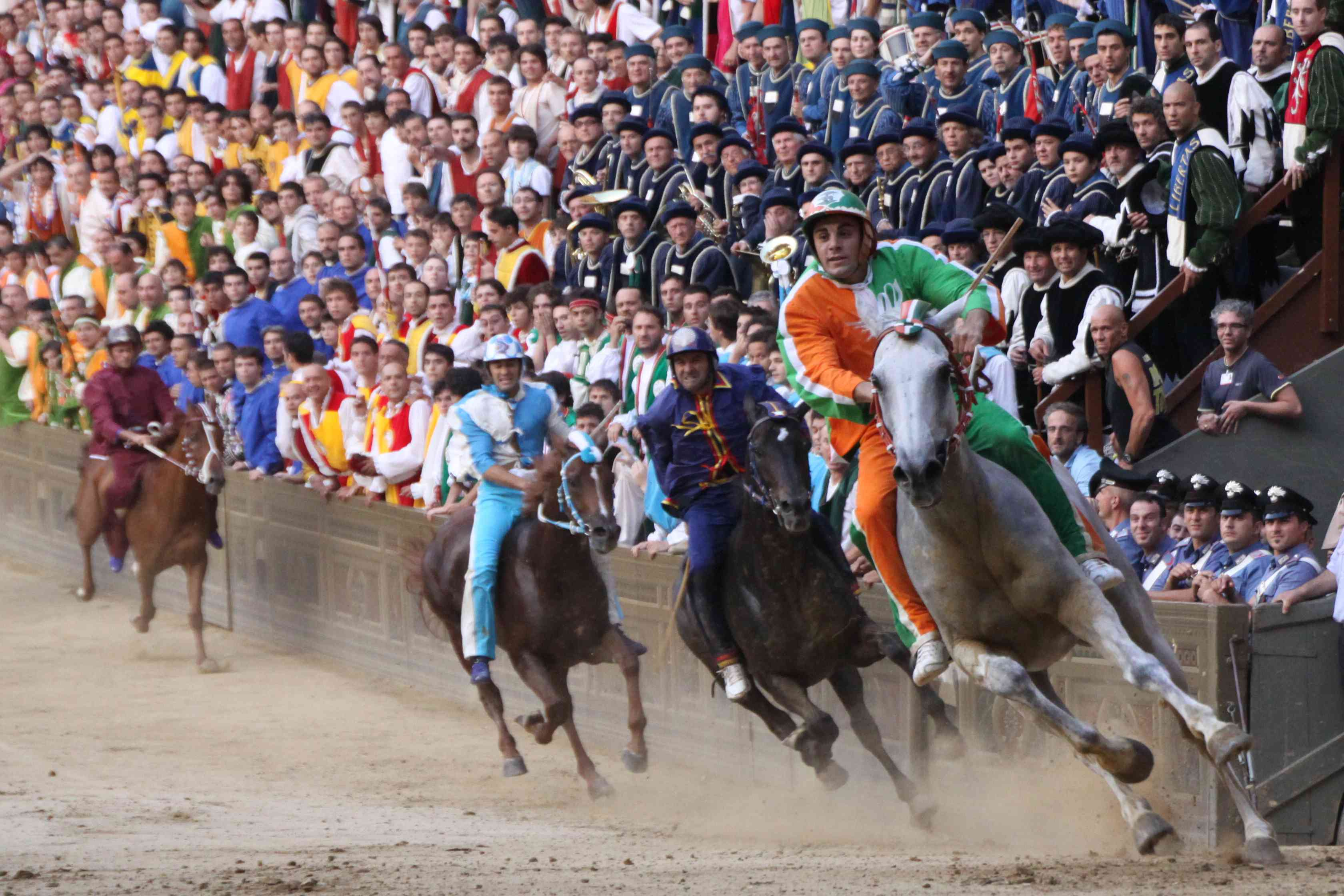 Un immagine del Palio di Siena del 2 luglio 2009. In primo piano il vincitore Silvano Mulas detto Voglia; alle sue spalle (da destra): Luigi Buschelli detto Trecciolino, Jonatan Bartoletti detto Scompiglio e Antonio Siri detto Amsicora.